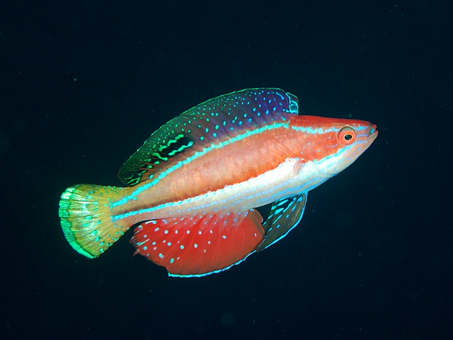 クレナイイトヒキベラ Cirrhilabrus katoi